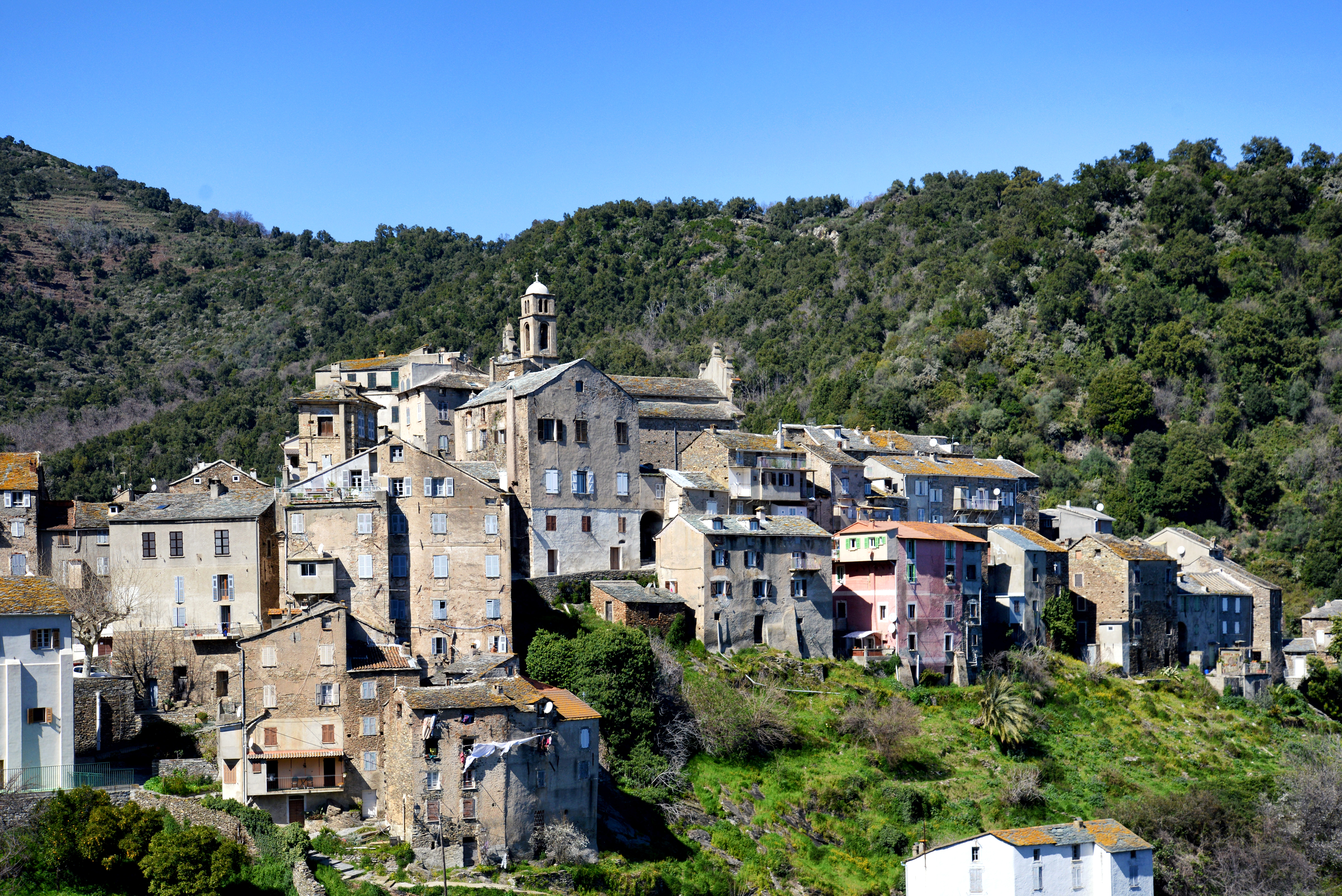 Vescovato, Casinca (Corse) - Vue du village